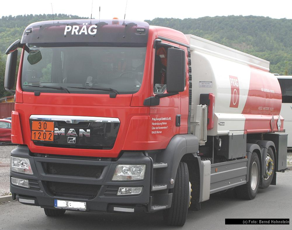 Tankfahrzeug